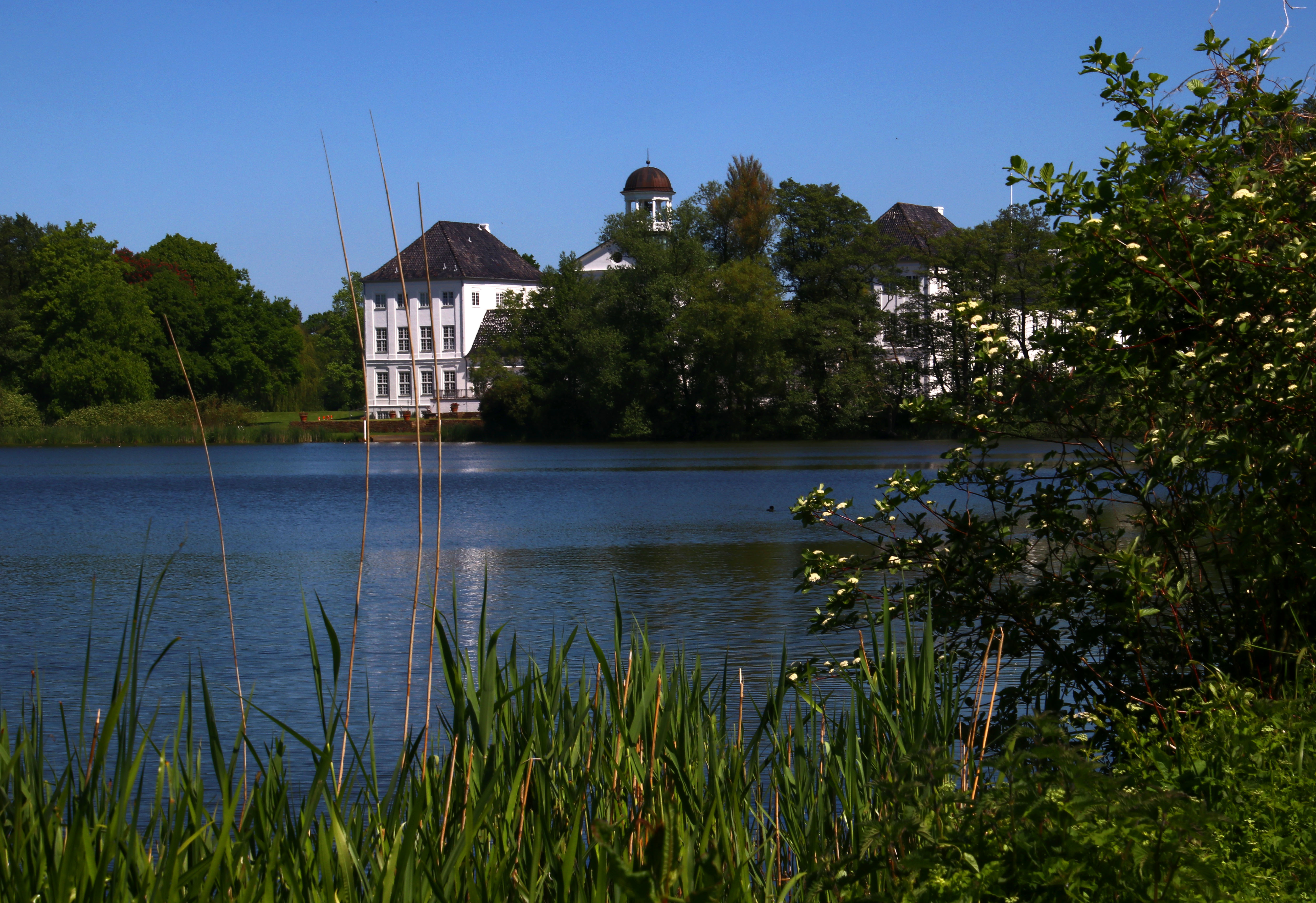 Gråsten. Ved Slotssøen.